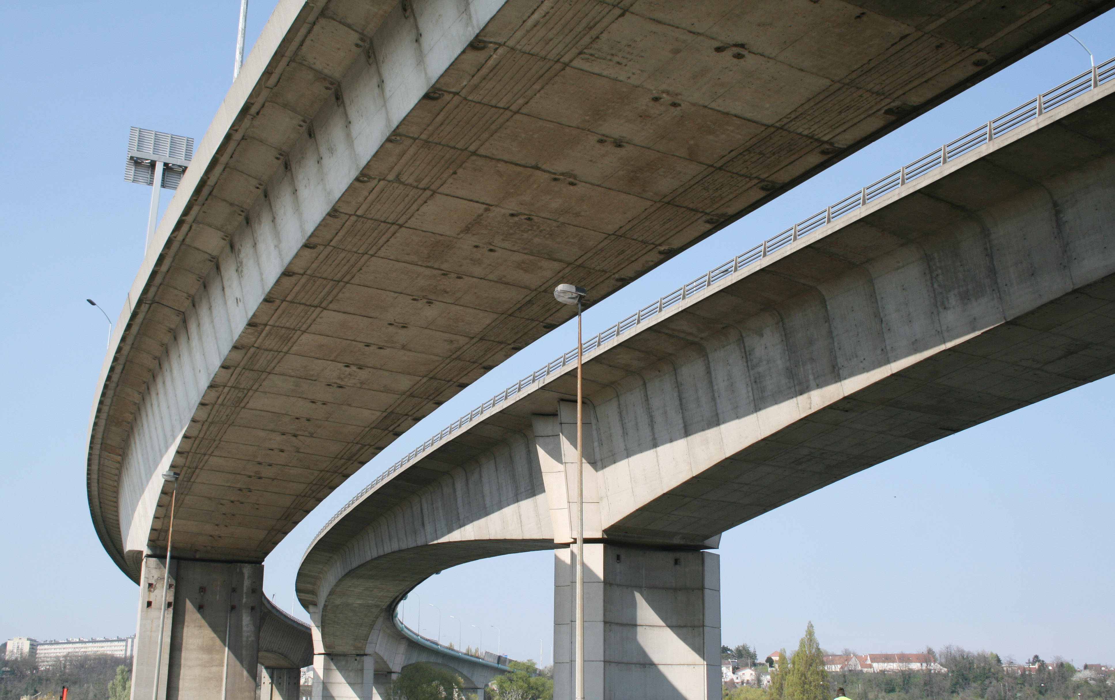 Pont d'Argenteuil vue d'en dessous